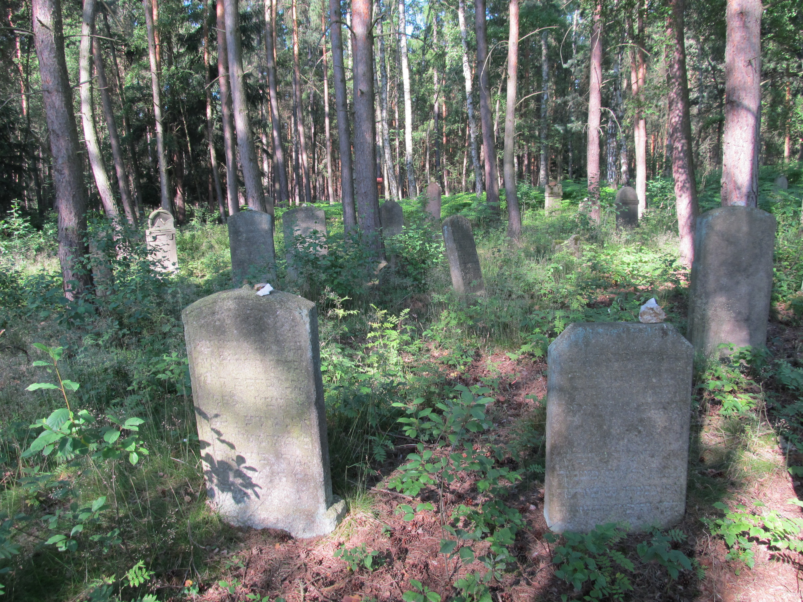 Židovský hřbitov Lomnička